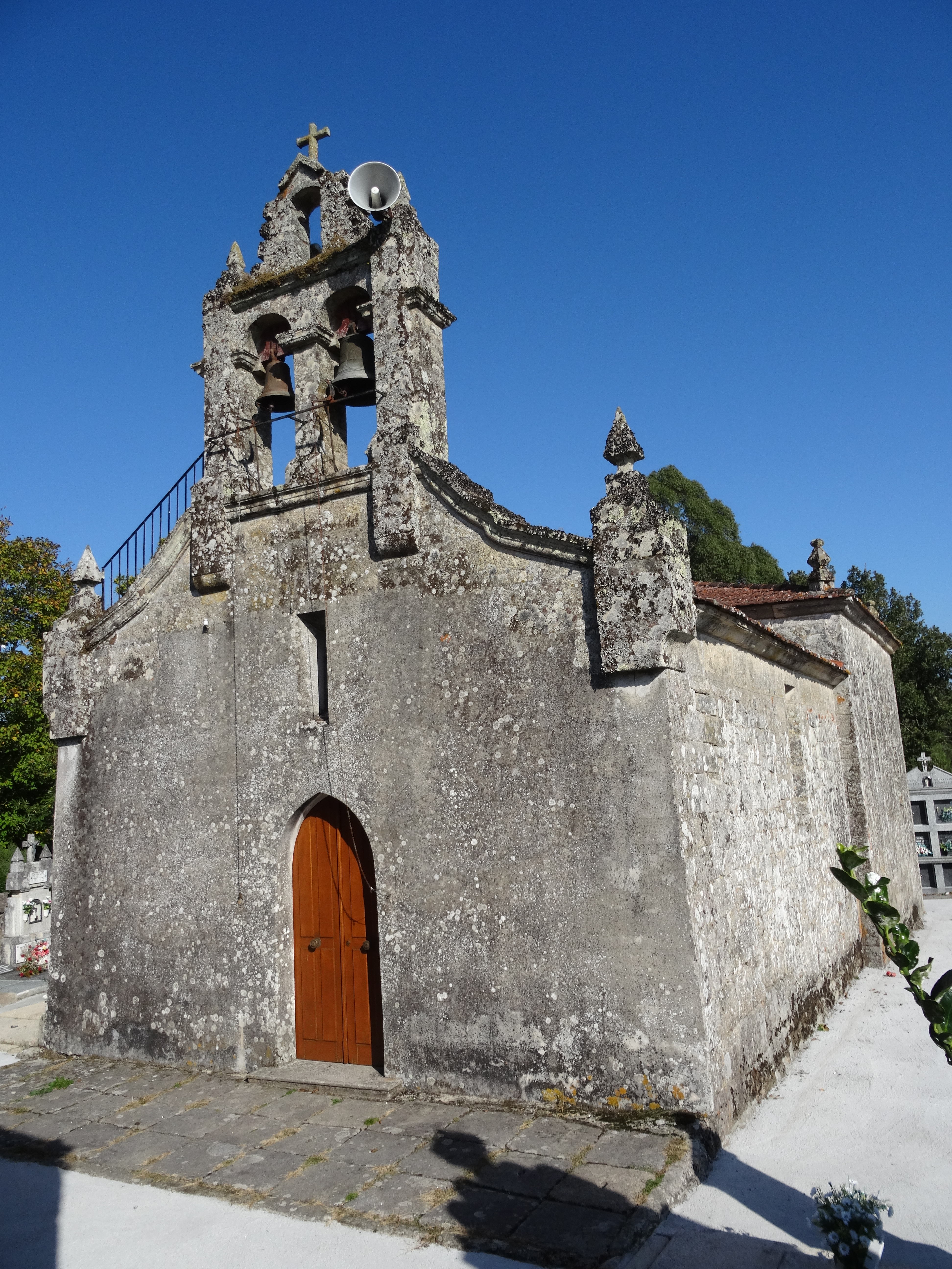 Ver título.